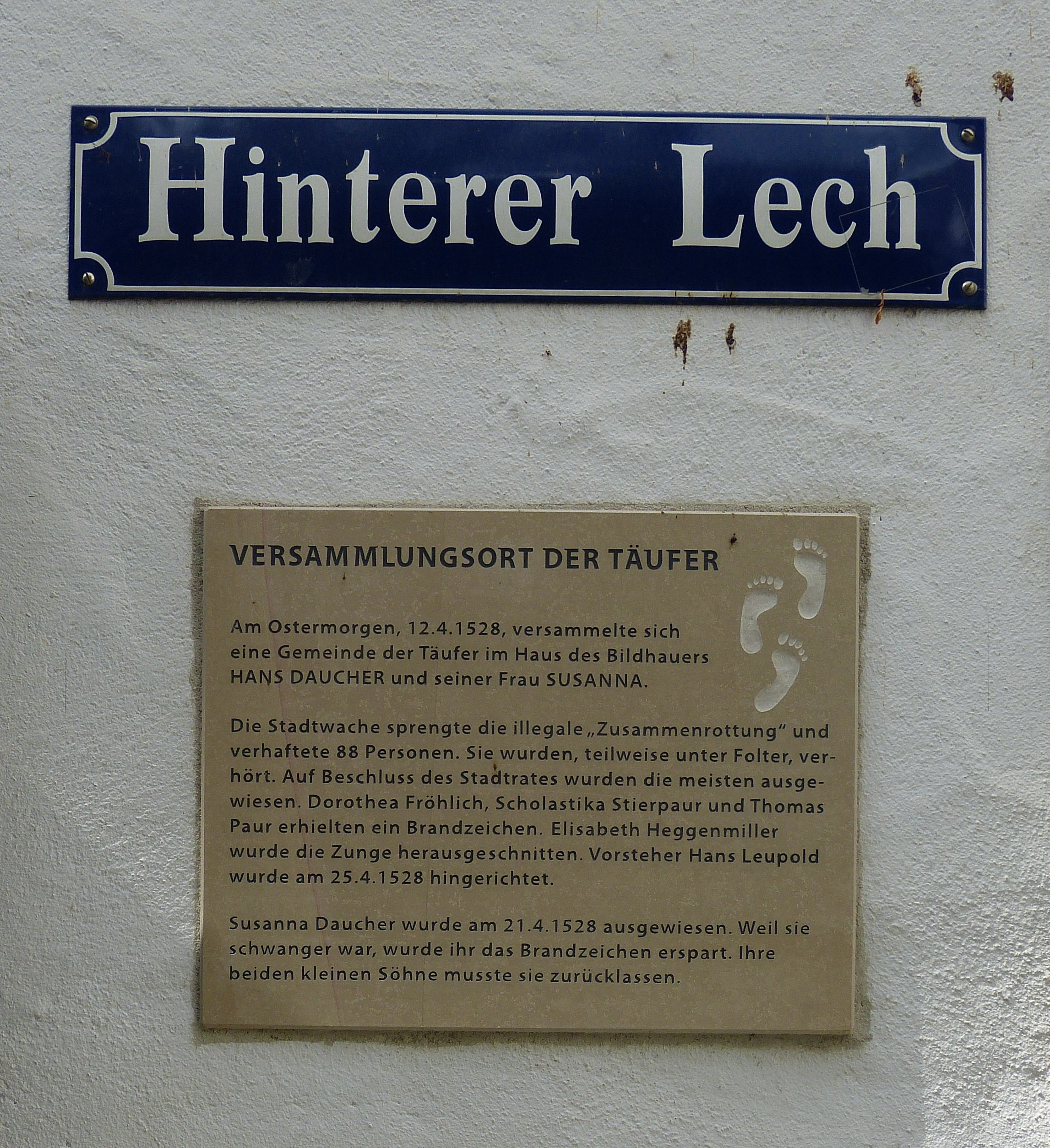 Augsburg, Hinterer Lech 2, Tafel zur Erinnerung an den Versammlungsort der Täufer und dessen Zerschlagung am 12.4.1528. This is a photograph of an architectural monument.